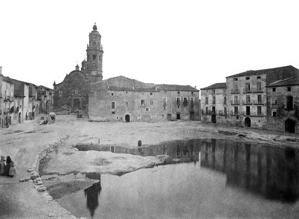 Imatge